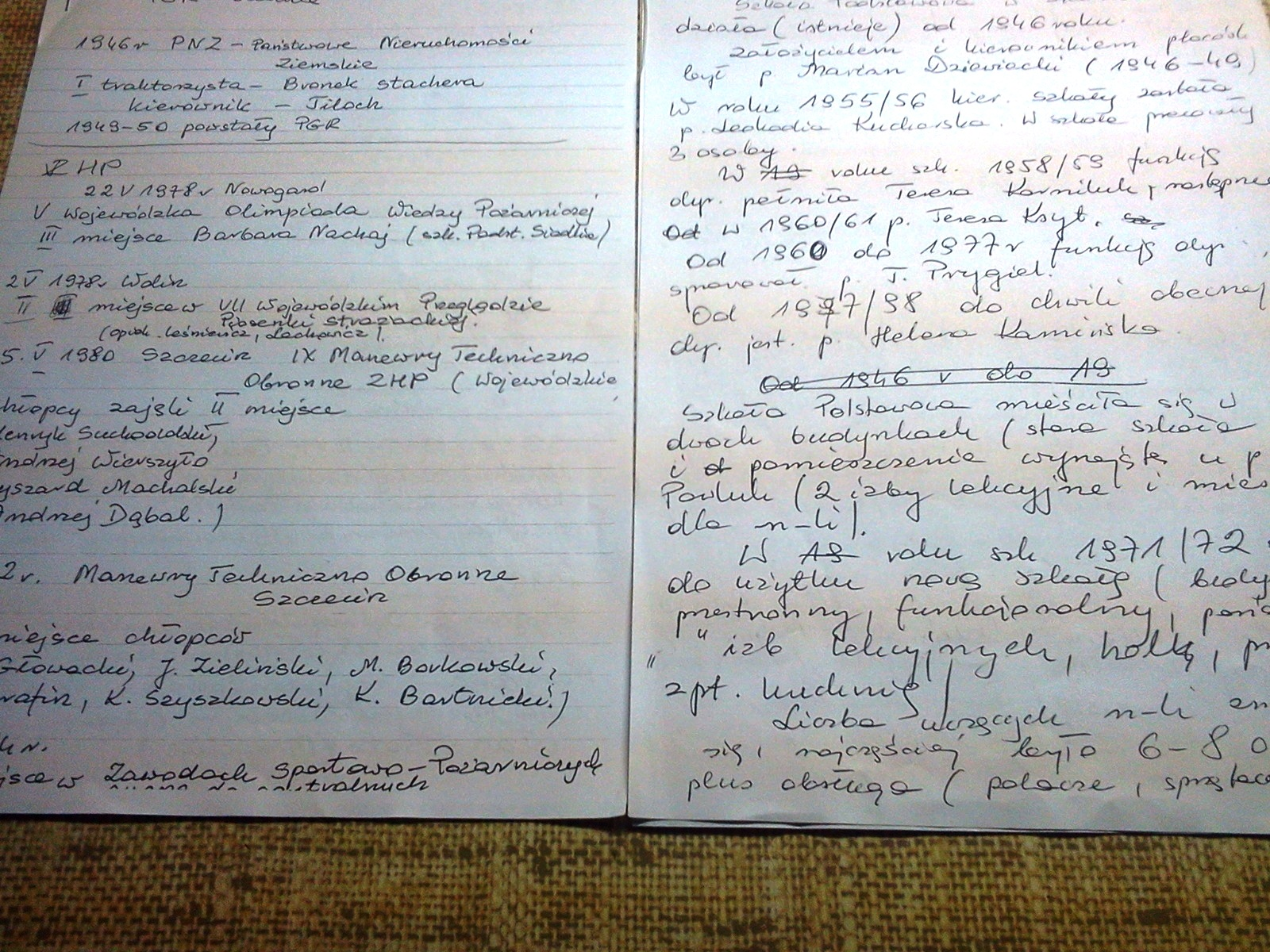 Krystyna Leśniewicz - wywiad środowiskowy - rękopis